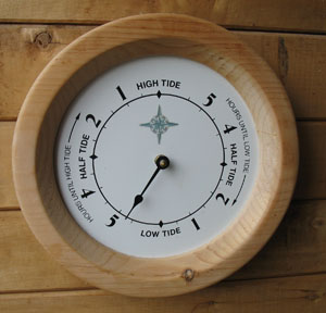 Tide Clock